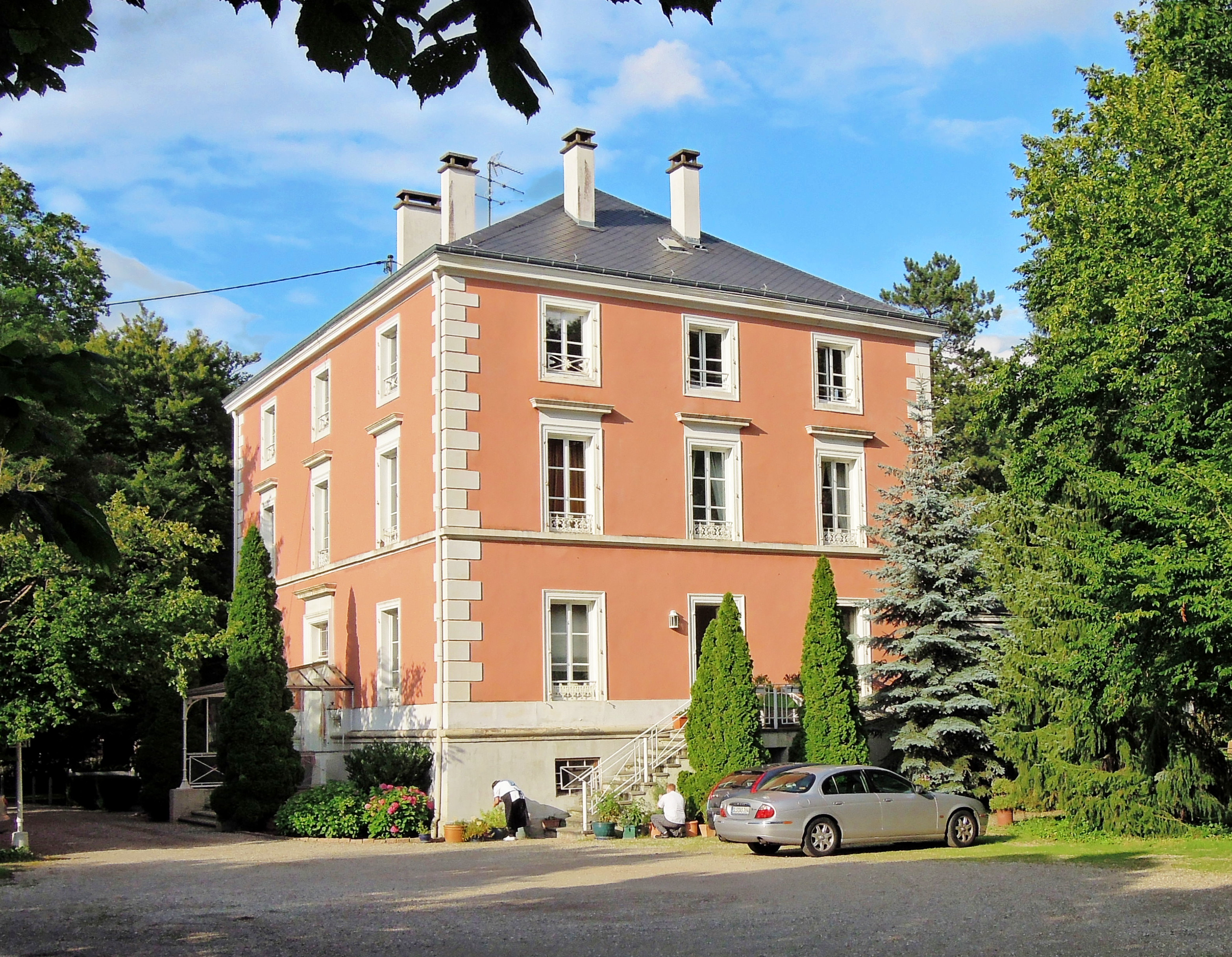 Hauptstraße 12, Villa Fayence mit dreiflügeligem Wirtschaftsgebäude, 1834-35 (Einzeldenkmal)